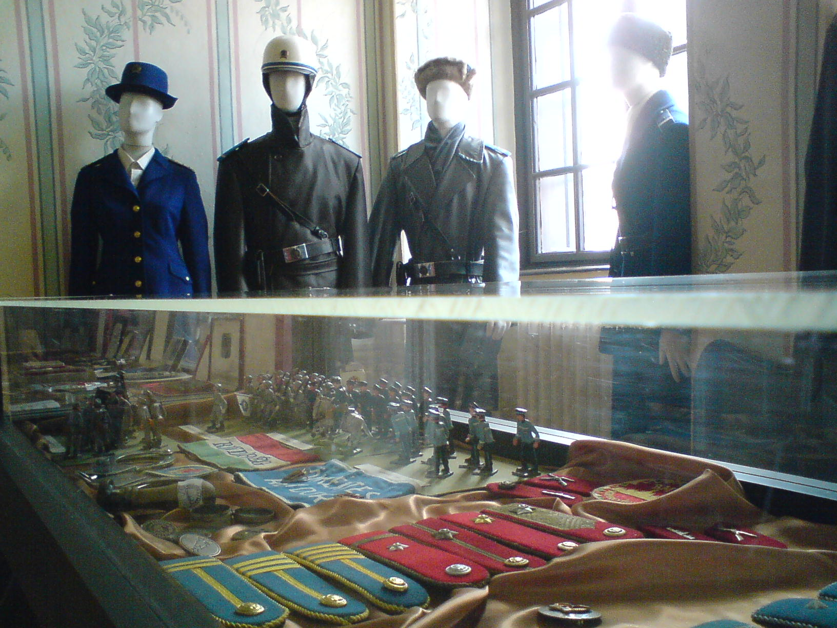 A Rendőrmúzeum Tarnamérai Kiállítóhelyén készült a fotó. Az 1970 és 1980 körüli egyenruhák, valamint a plexi tárolóban rendőr makettek és rendfokozatok láthatók.